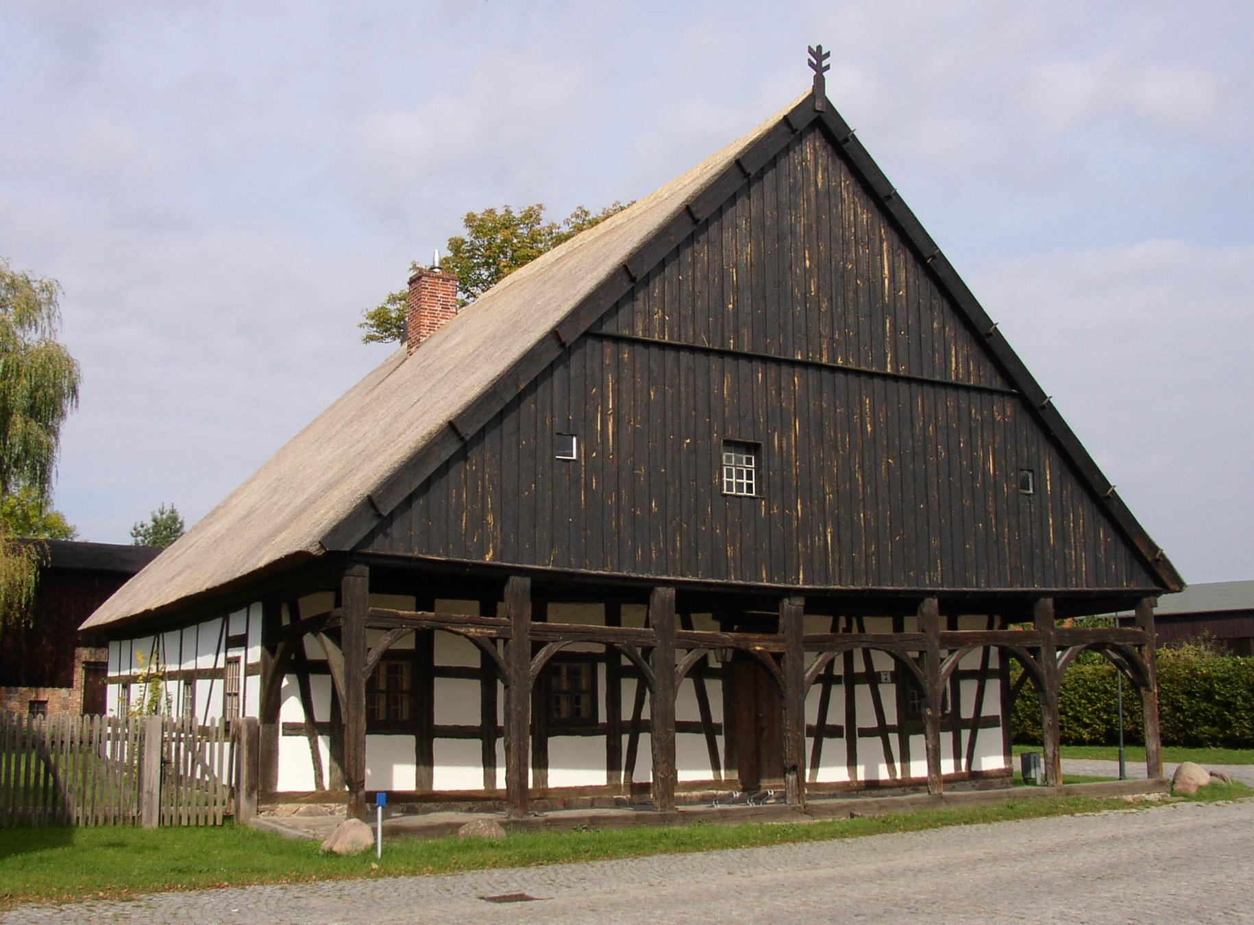 Vorlaubenhaus (Biegener Str. 3) in Jacobsdorf-Pillgram in Brandenburg, Deutschland